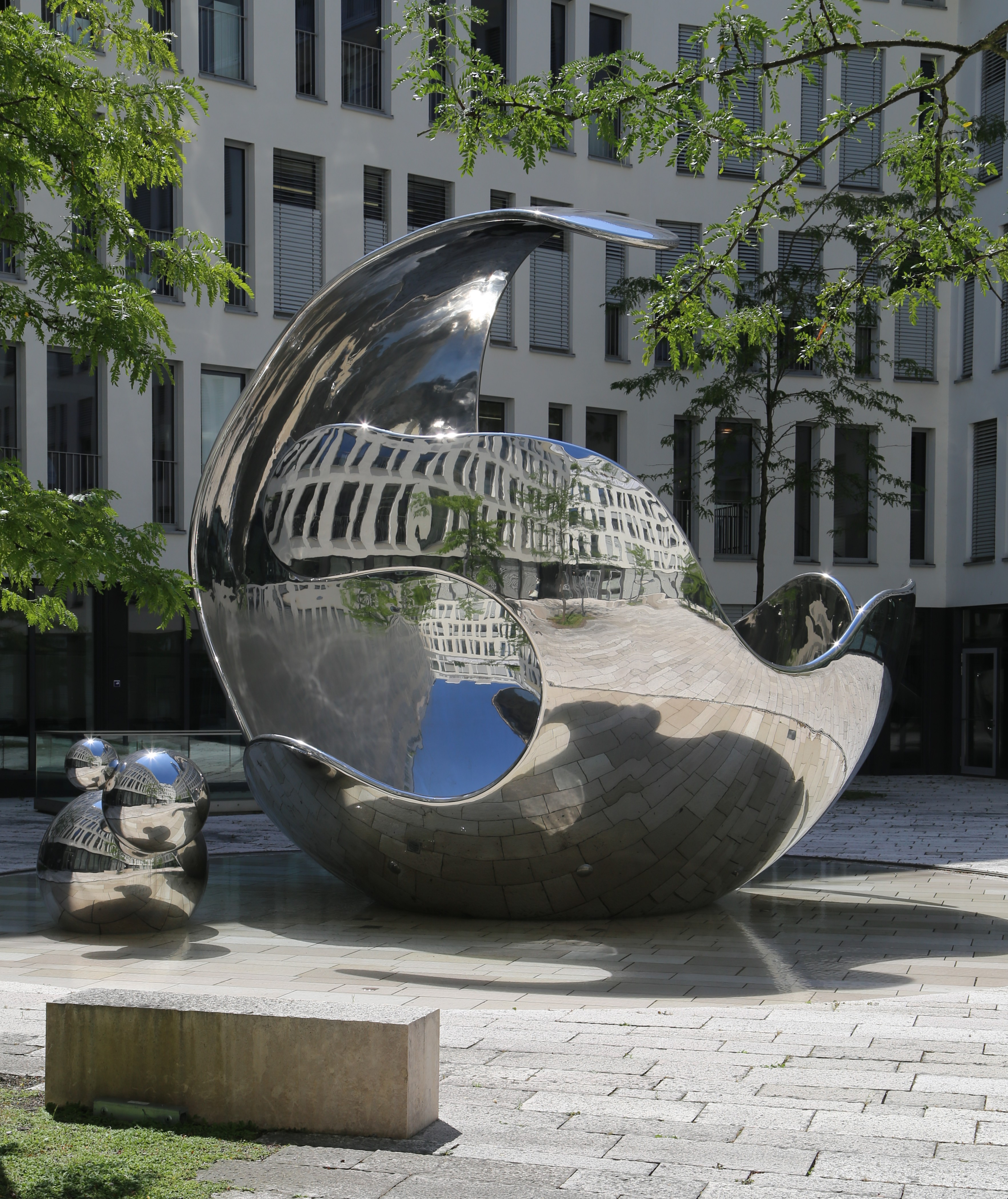 Christopher Klein: Airborne, 2008, Edelstahl, Durchmesser 6,40 m; Oberanger 33 (Angerhof), München